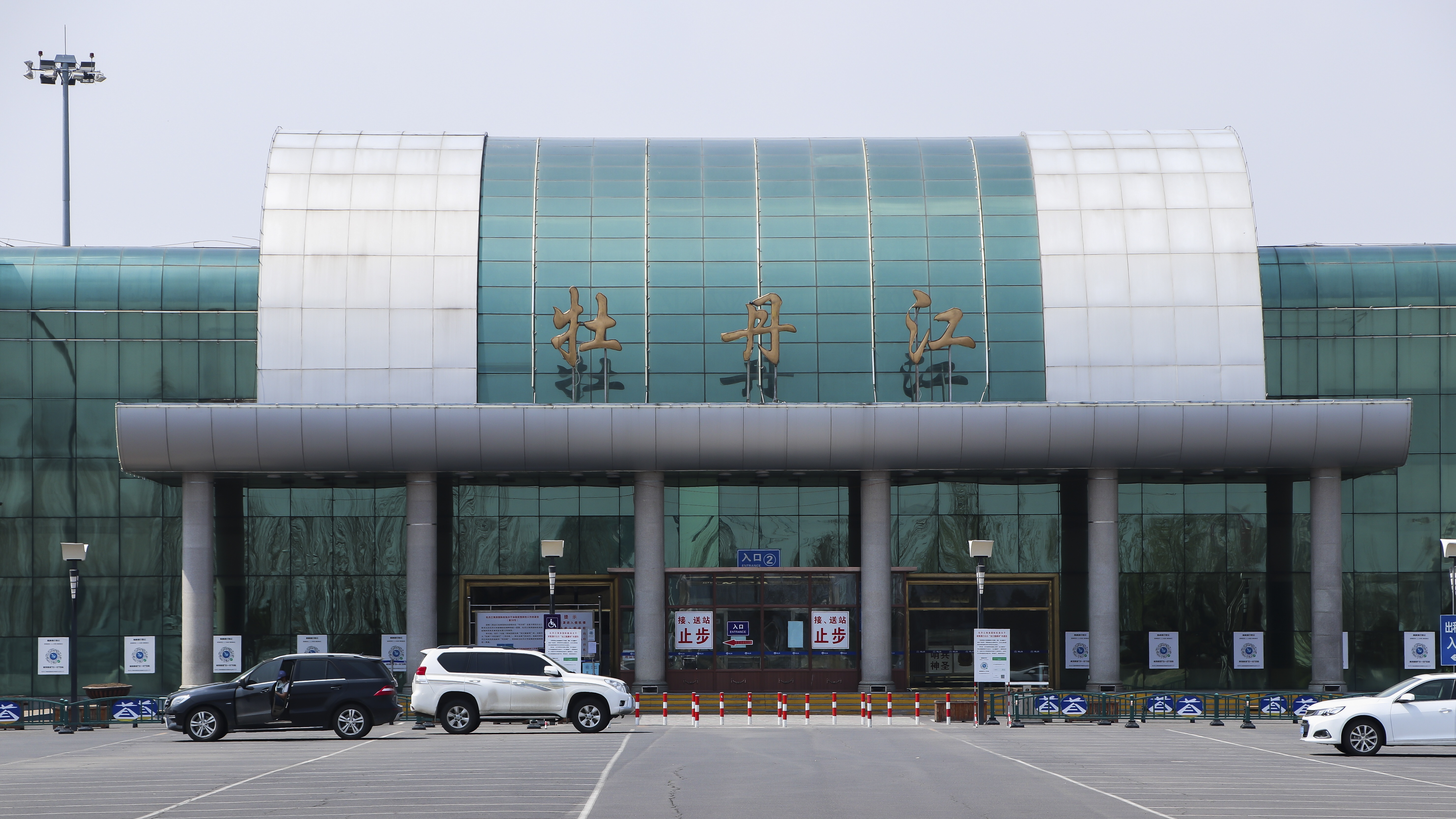 中文（中国大陆）: 牡丹江海浪机场航站楼